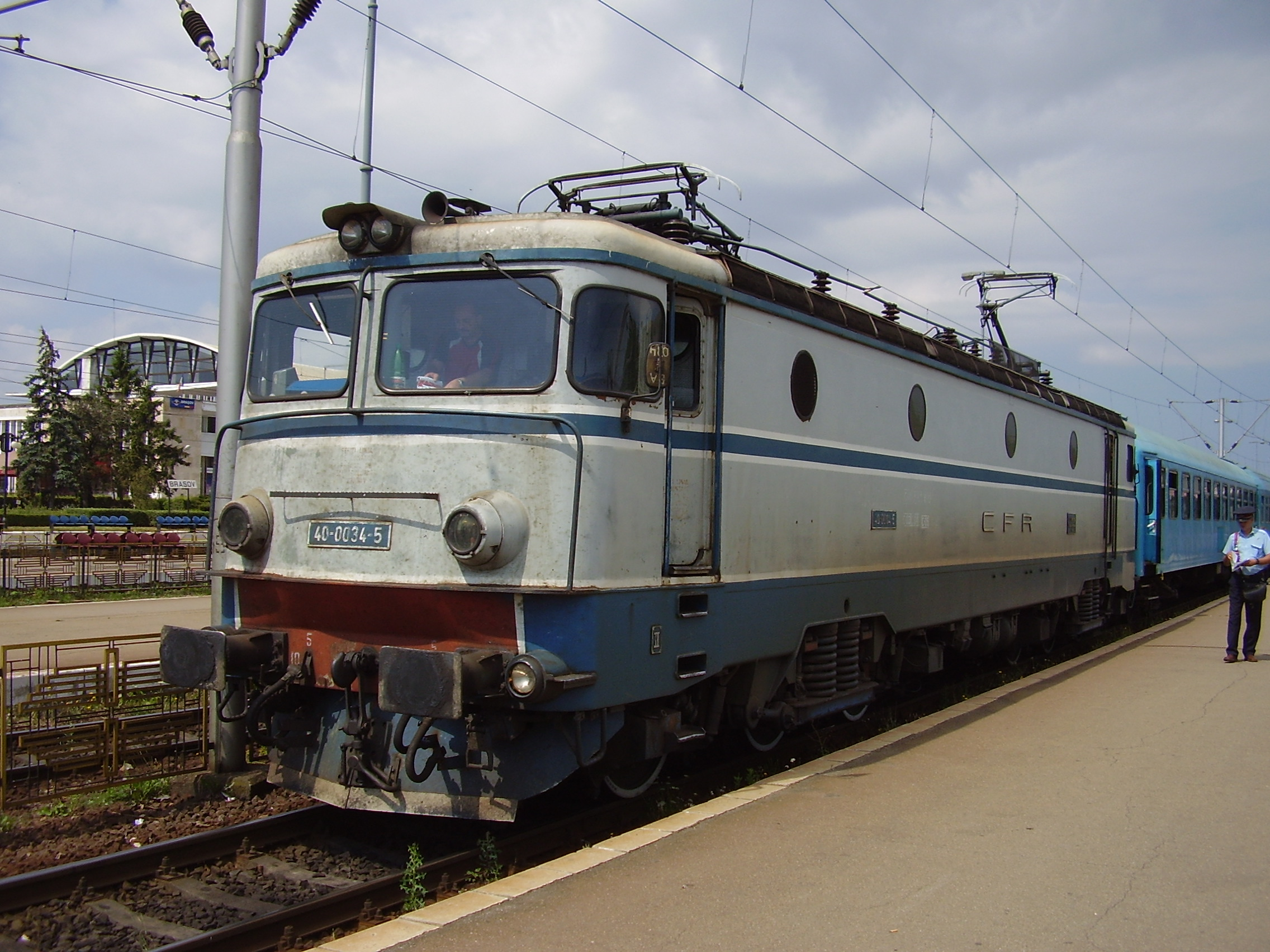 40-0034-5 în Gara Braşov. Foto: Dr2005.